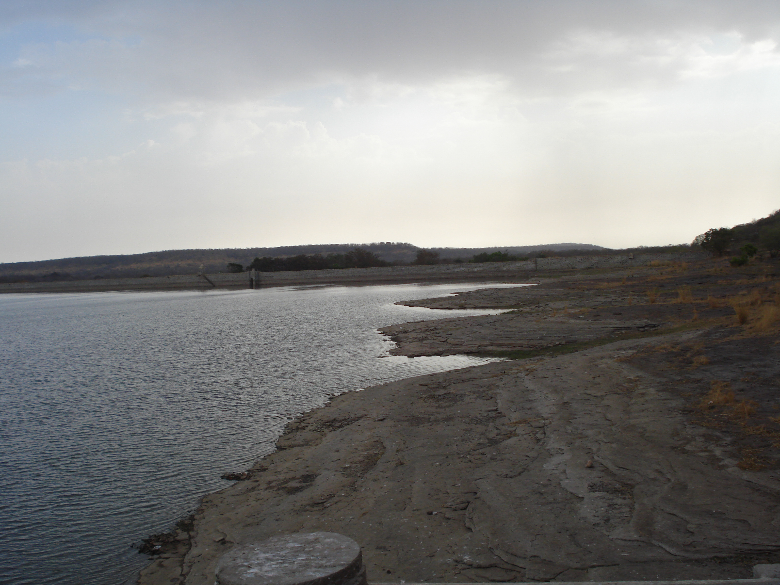 Madhav Natioinal Park in Shivpuri Madhya Pradesh